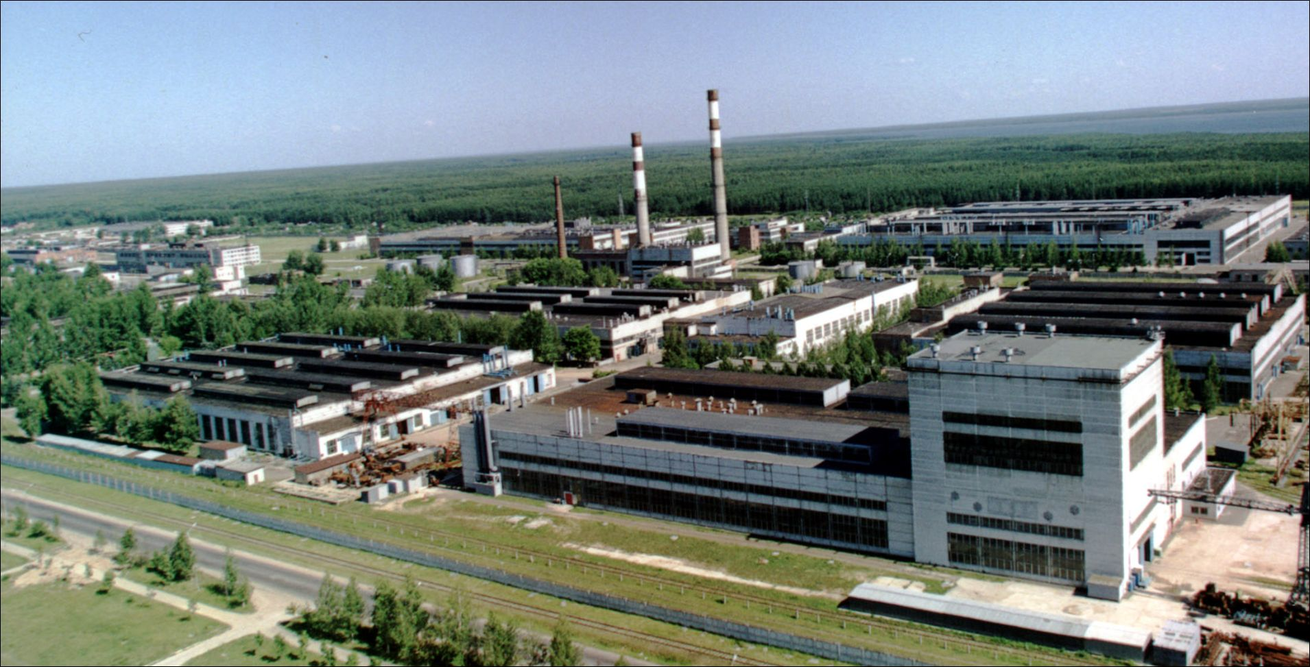 Вид на Волжский машиностроительный завод из окна